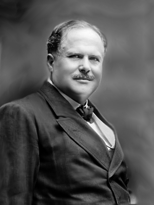 Alfredo Panzini